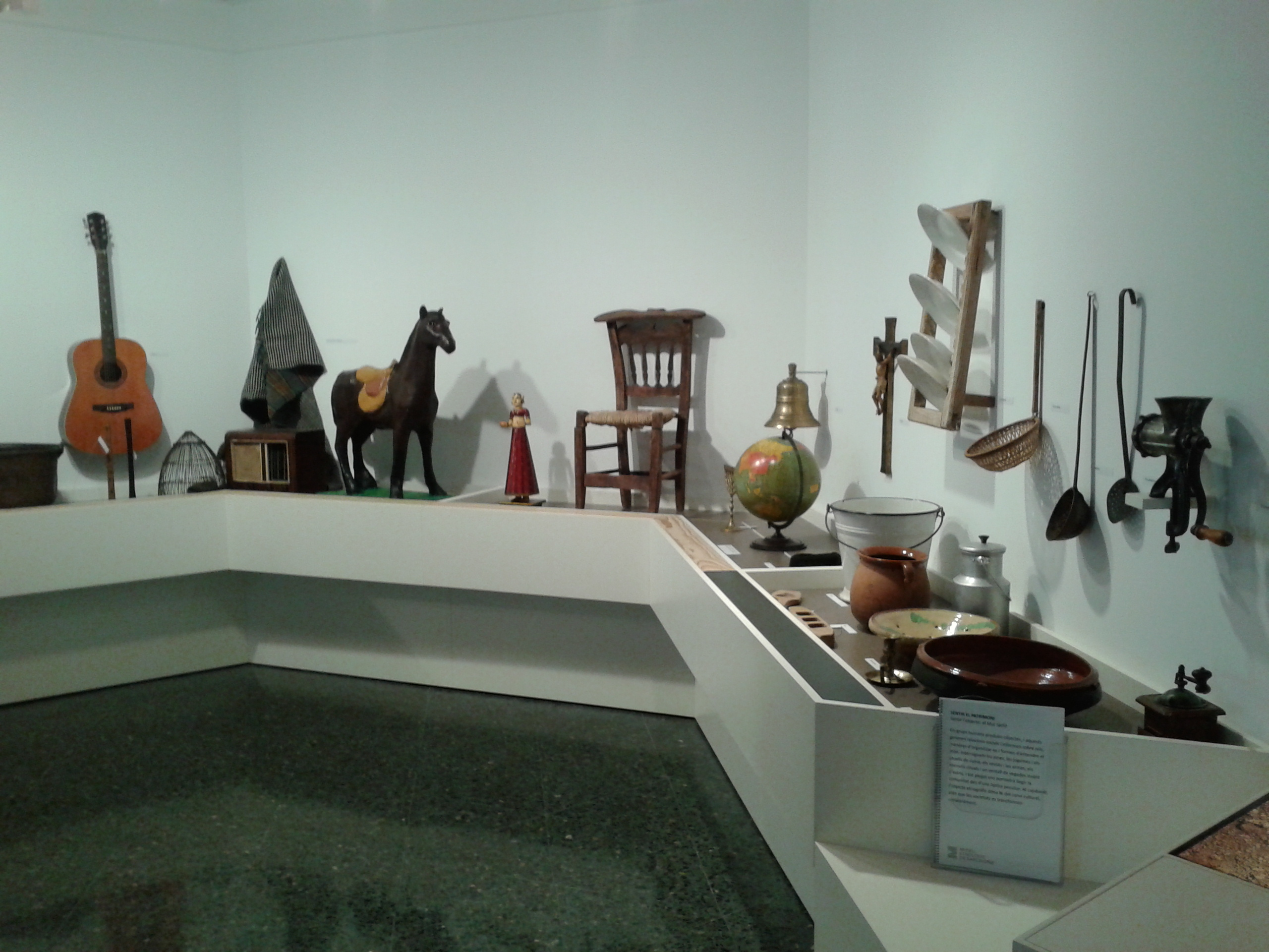 Sala del Museu Etnológic de Barcelona